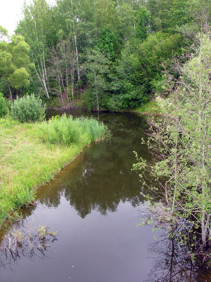 Bugenis, Virvytės kair. intakas. Mažeikių raj., Viekšnių seniūnija. Foto: Algirdas, 2006 m. liepos 18 d., Lietuva